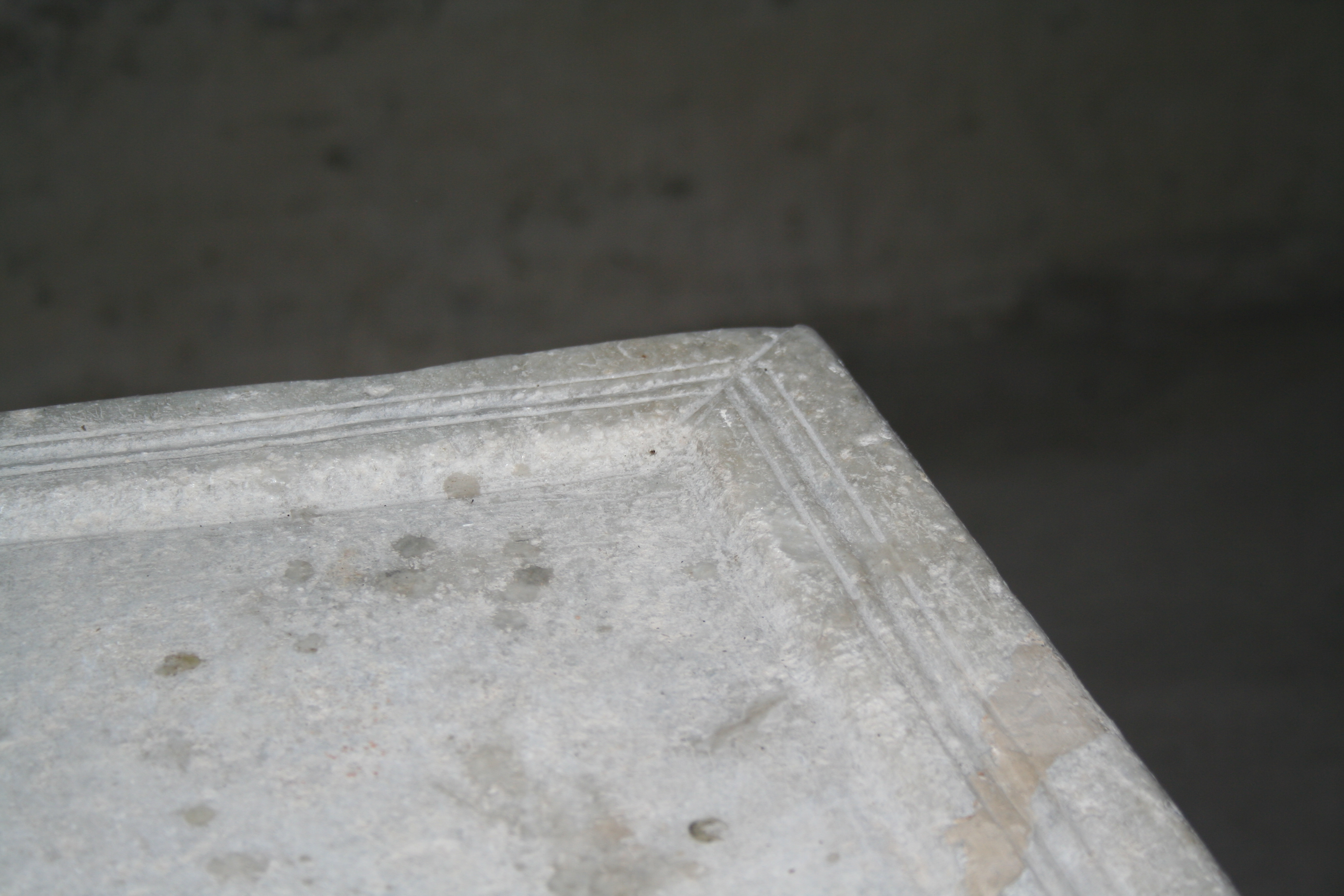 Altarecke in der Kapelle St. Lorenzo (Paspels)